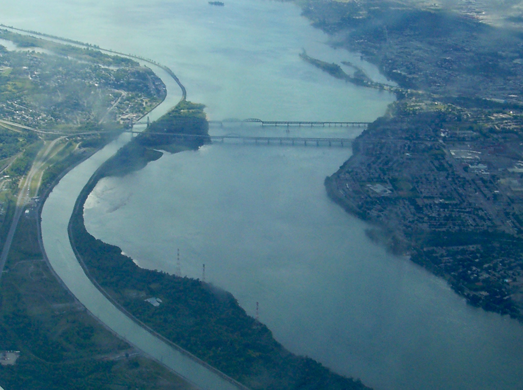 vue aérienne du saint laurent près de Montreal